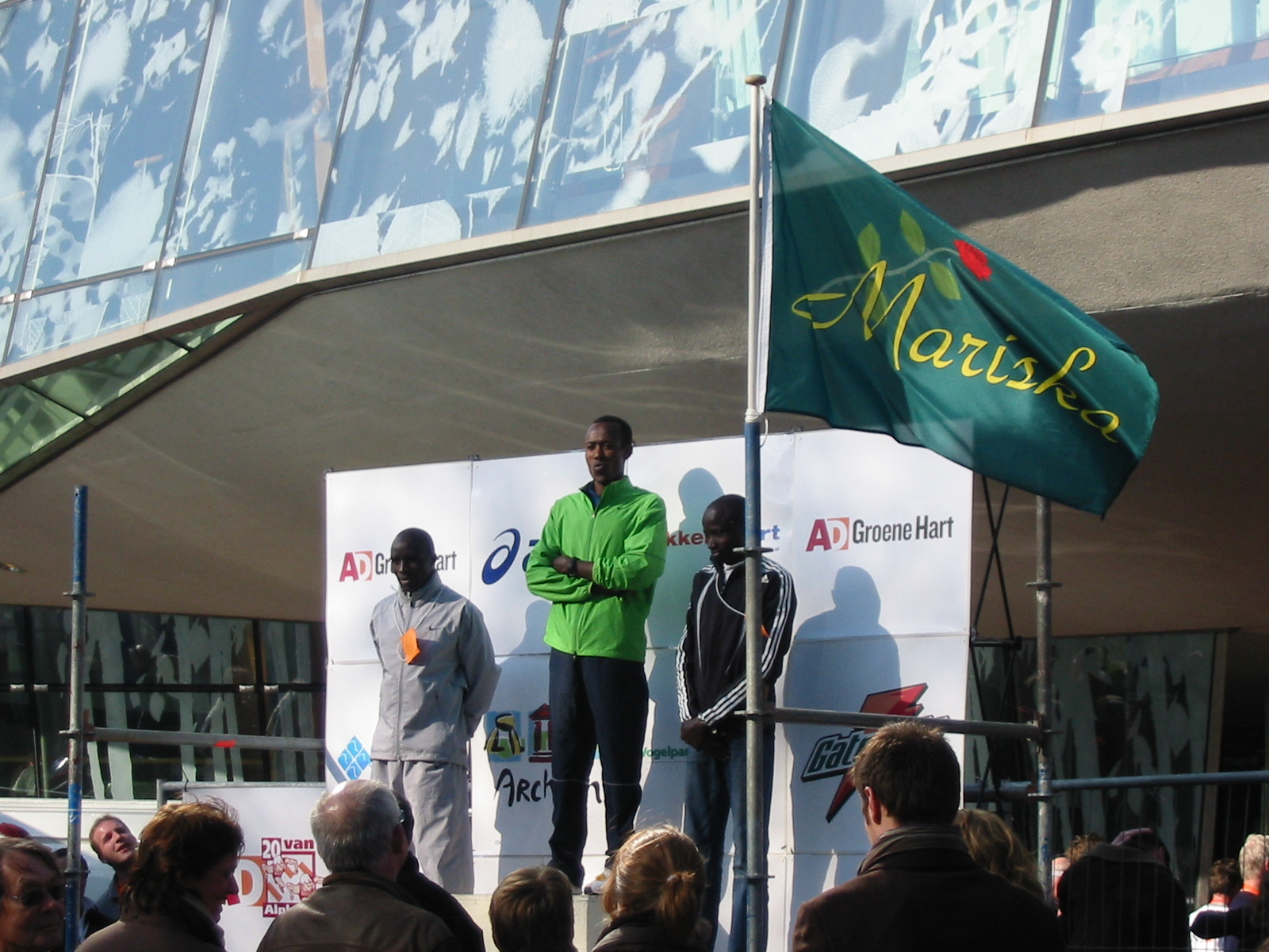 Twintig van Alphen Winnaars heren 2007